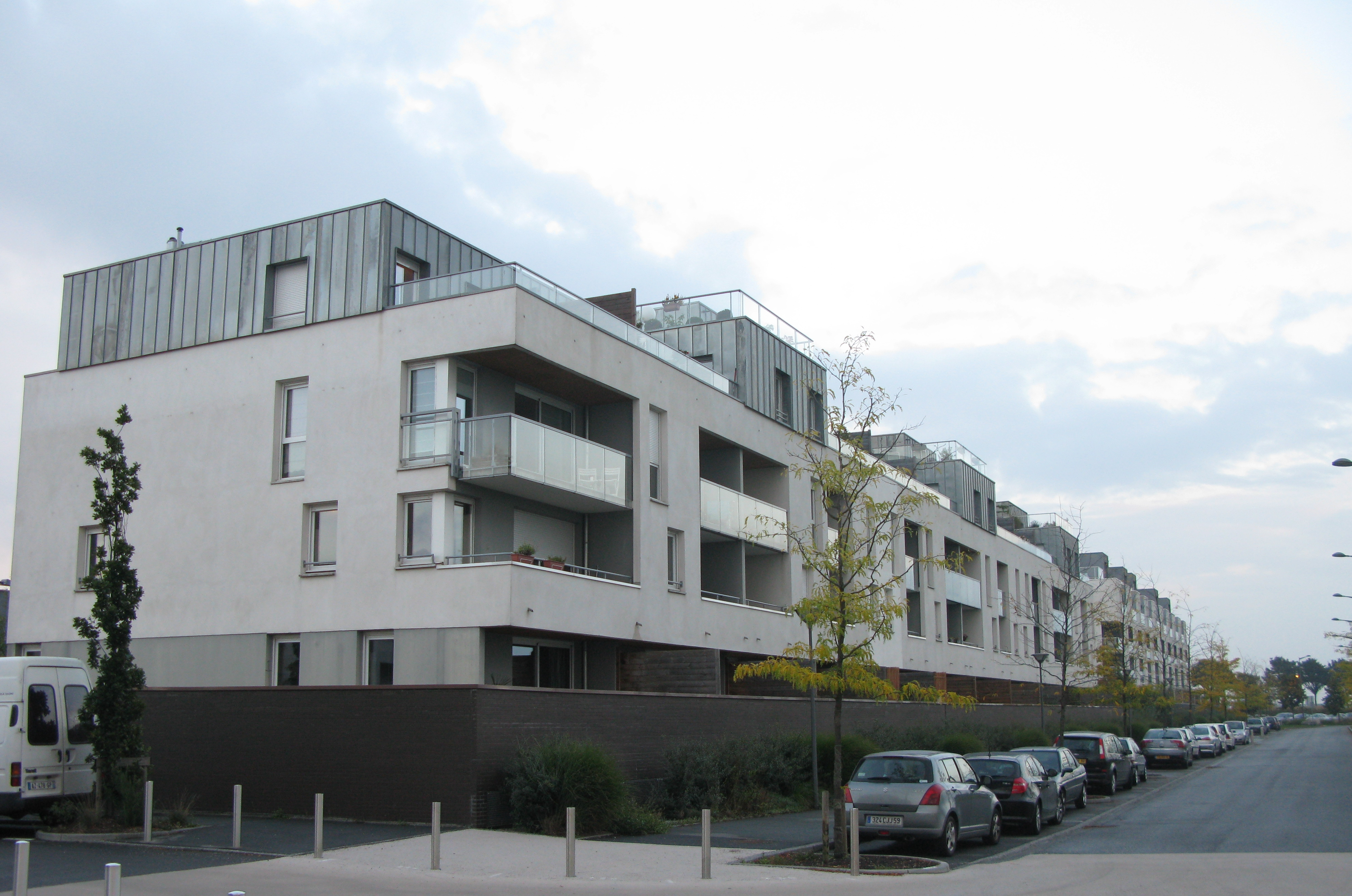 Logements modernes à la Haute Borne, à Villeneuve d'Ascq.